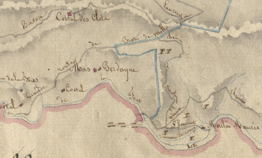 Manyaques, de Montferrer, en el Cadastre napoleònic del 1812 (Arxius Departamentals dels Pirineus Orientals)